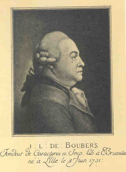 Jean-Louis de Boubers, imprimeur bruxellois